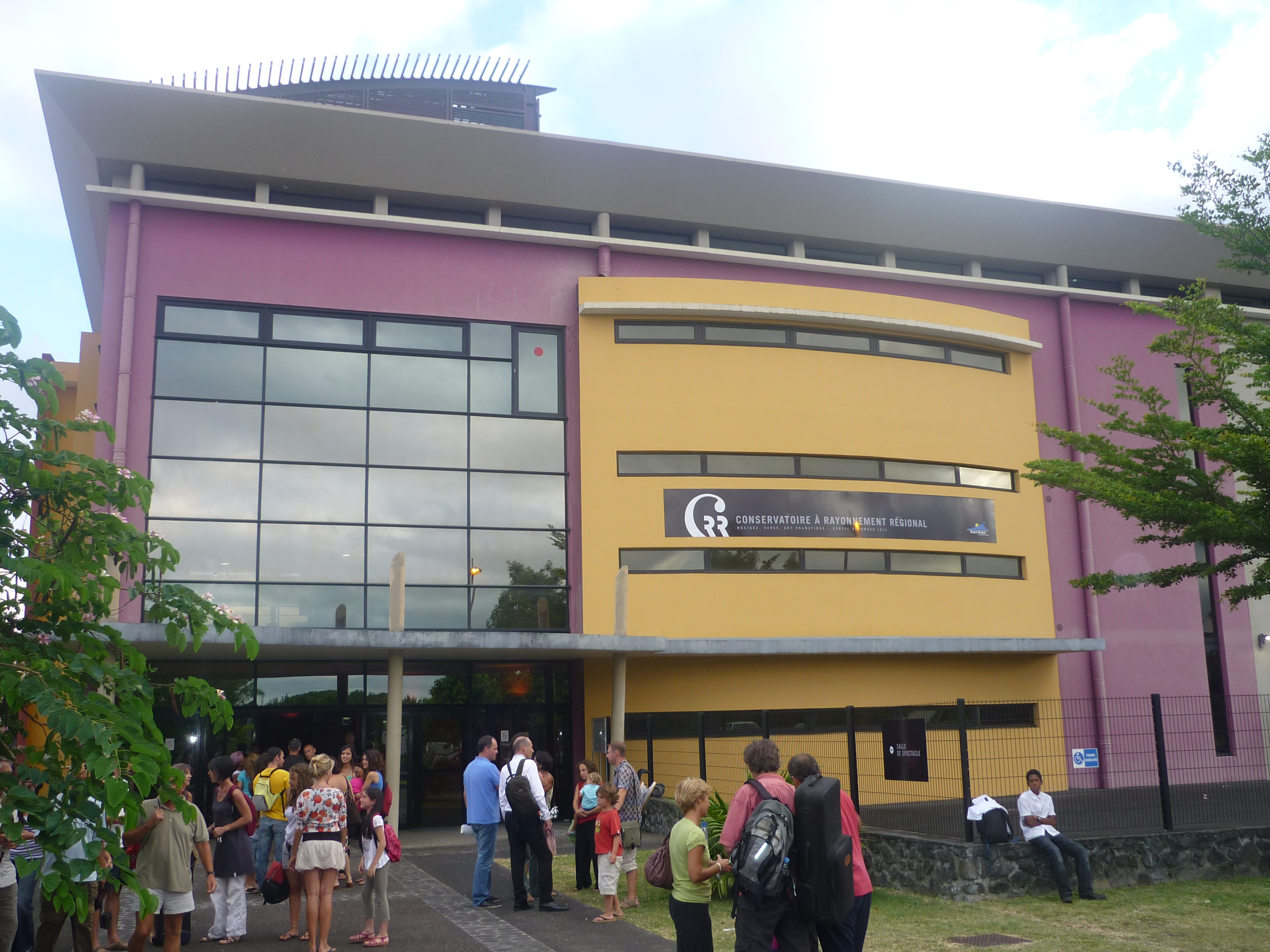 Le conservatoire à St-Benoît.